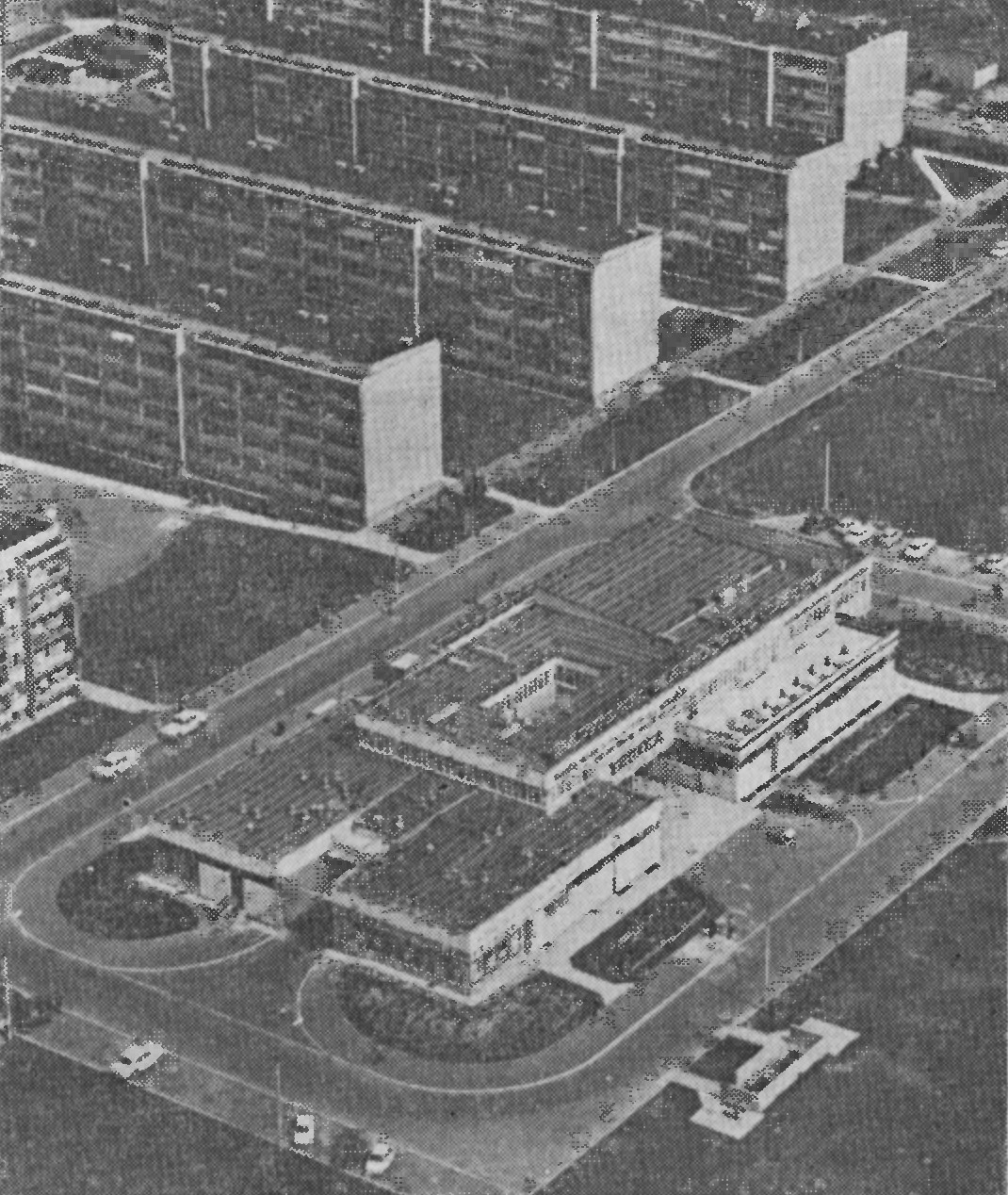 os. Manifestu Lipcowego (Osiedle Armii Krajowej) zdobyło w 1977 tytuł najlepszego w kraju osiedla mieszkaniowego. Widok na Dom Przyjaźni "Trojka"